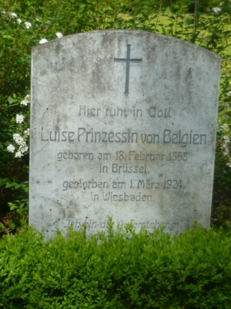 Tombe de la Princesse Louise de Belgique à Südfriedhof (Wiesbaden)